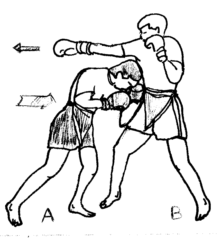 tête1.jpg